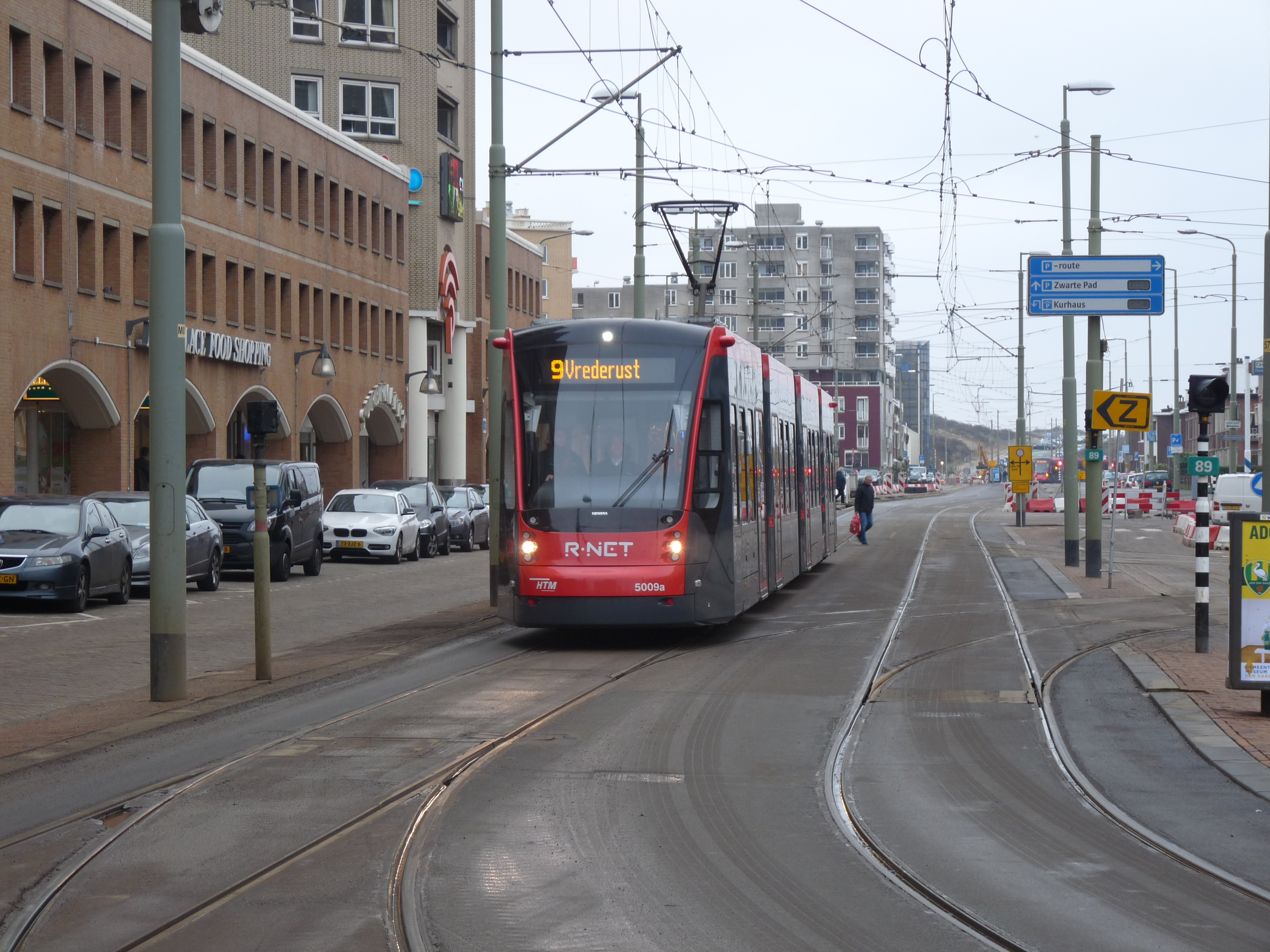 Aveniotram in Scheveningen op de eerste dag dat ie daar rijdt.